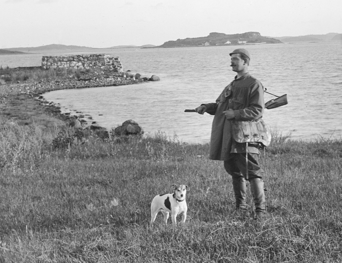 Den norske billedkunsneren Carl Dørnberger på jakt.